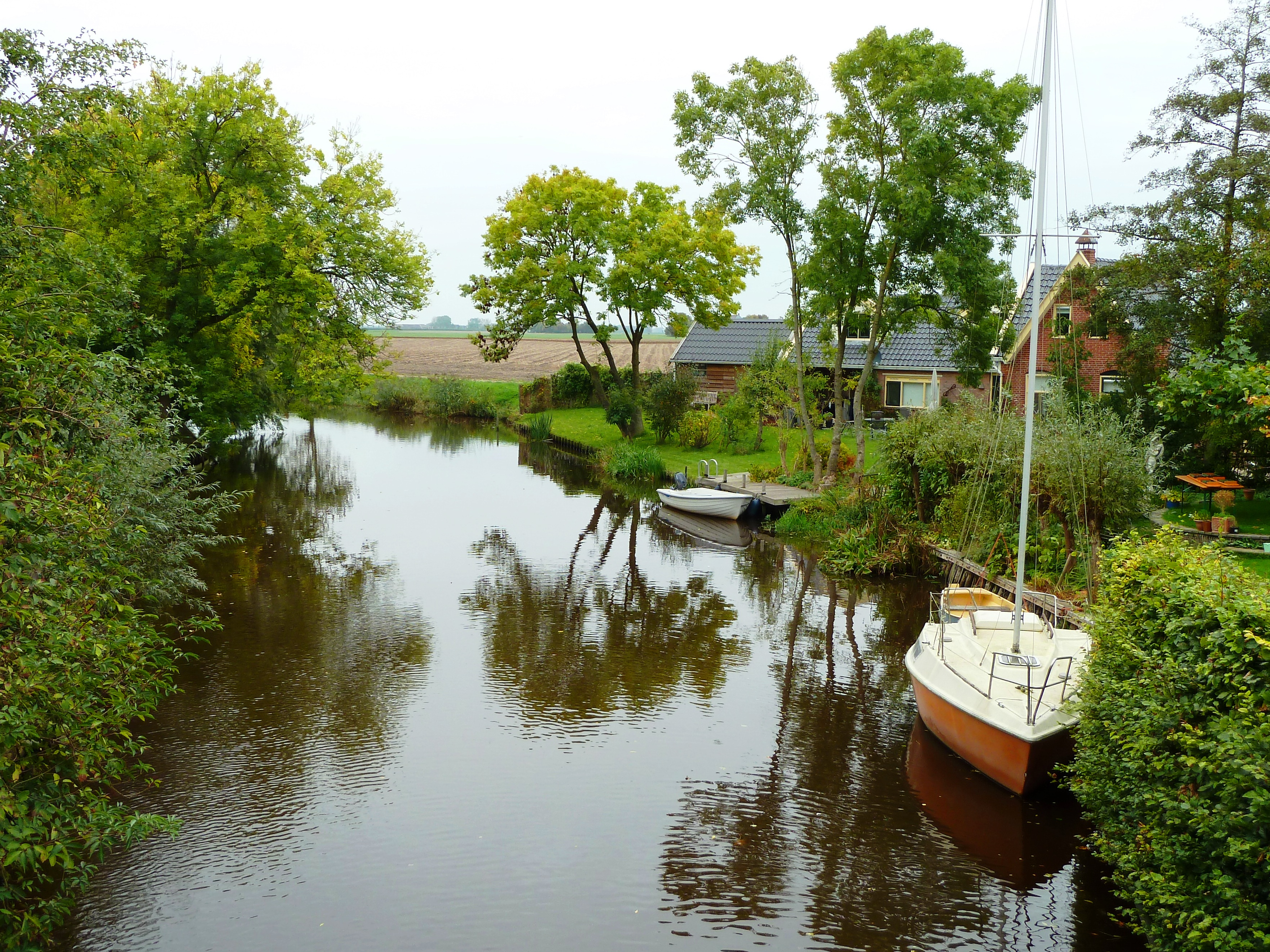 Kommerzijlsterdiep gezien vanaf de brug in Niezijl.